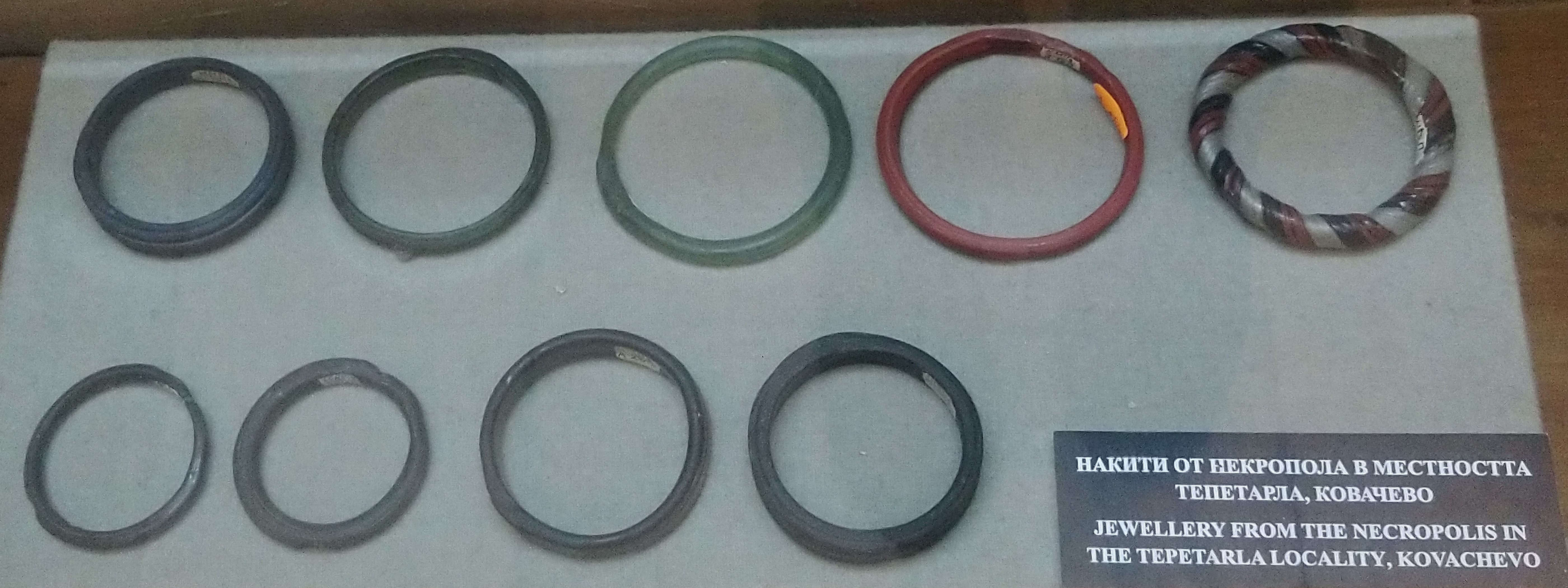 Исторически музей Пазарджик - Накити от некропола в местността Тепетарла, Ковачево